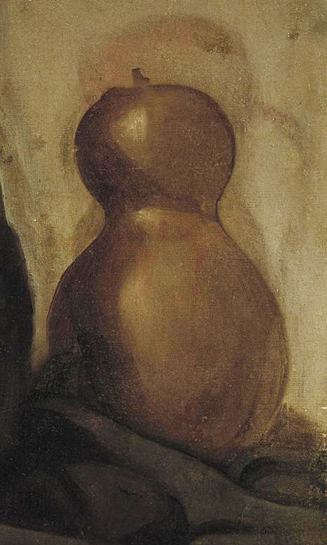 Retrato del bufón español Juan Calabazas († 1639), que sirvió al cardenal-infante Fernando de Austria y posteriormente al hermano de este último, el rey Felipe IV de España.